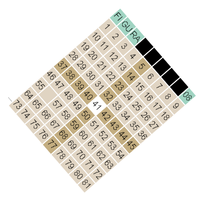 Muestra como hallar rápidamente los valores para las diagonales de un cuadrado mágico esotérico de lado impar.